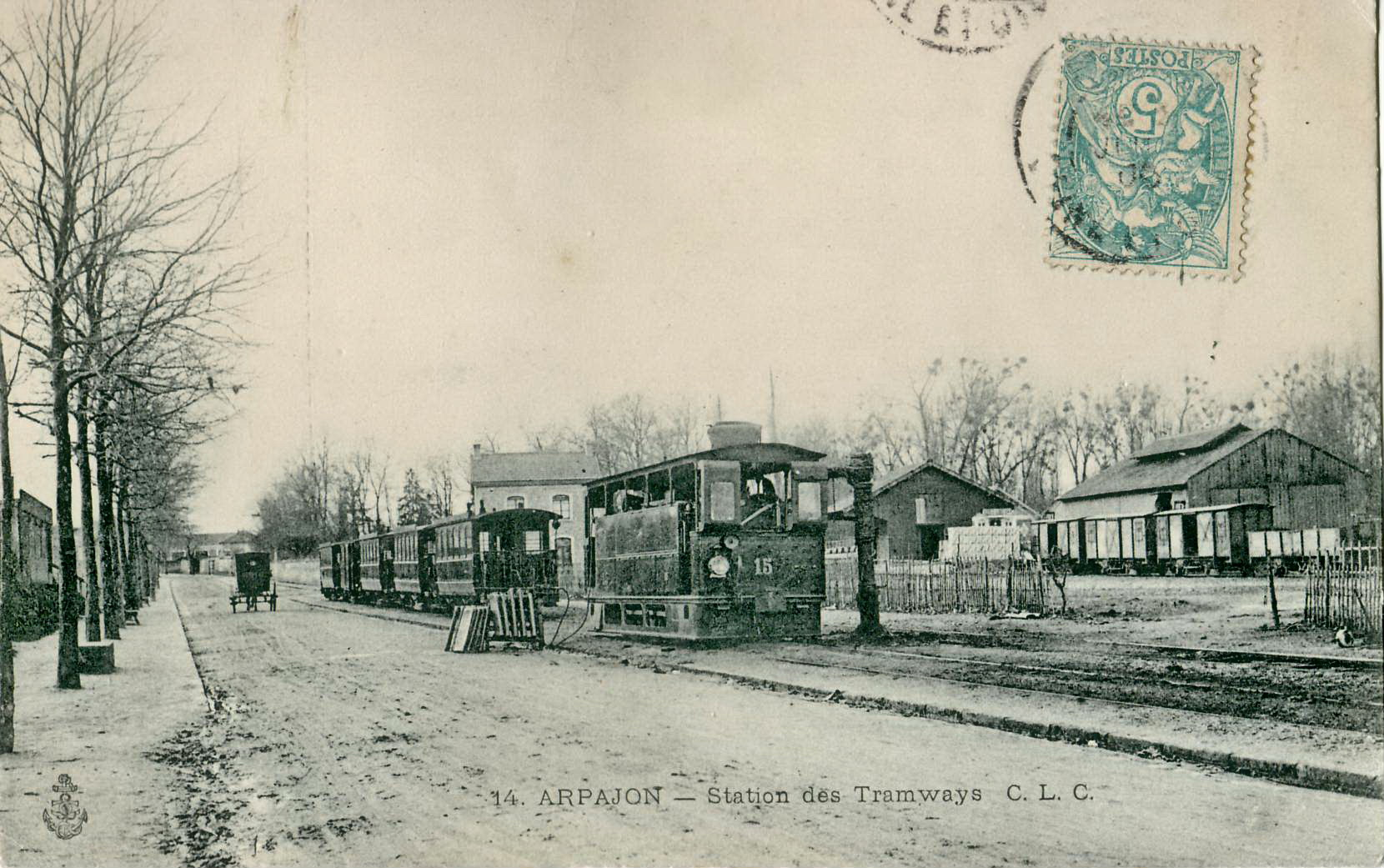 Carte postale ancienne éditée par CLC, N°14ARPAJON : Station des Tramways A cette époque, la gare d'Arpajon était le terminus de l'Arpajonnais et du Chemin de fer de Grande Banlieue (CGB), réseau de chemin de fer secondaire du département de Seine-et-Oise.